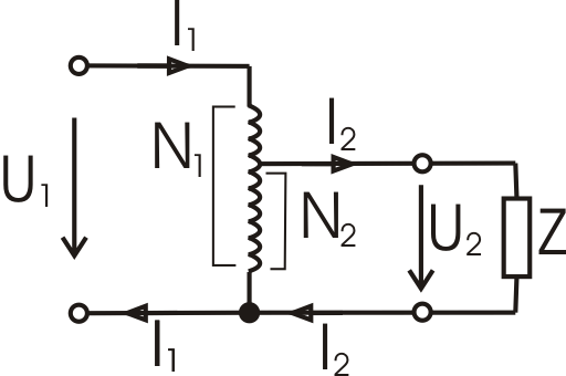 Schéma autotransformátoru